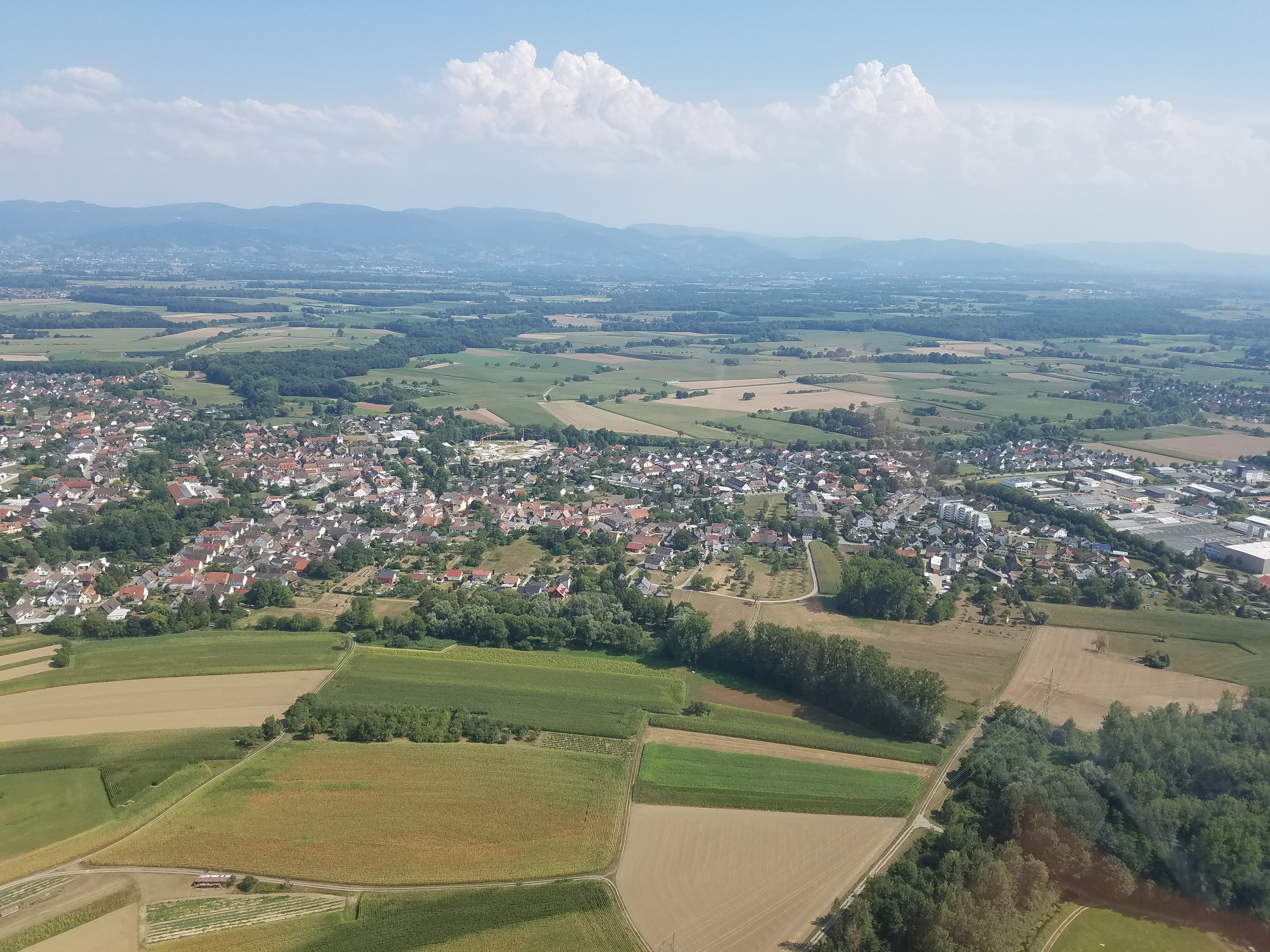 Luftaufnahme von Lichtenau von Nordwesten aus